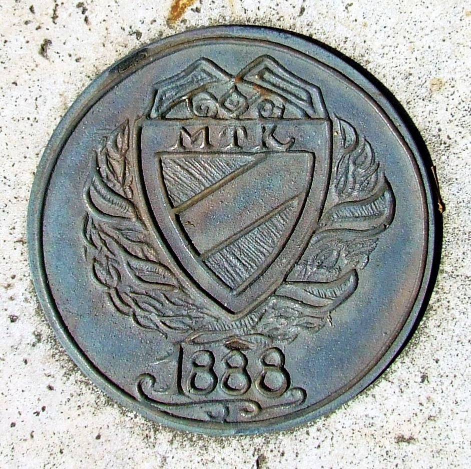 Az MTK logója. Dombormű Hidegkuti Nándor sírján. Mihály Gábor szobrászművész alkotása